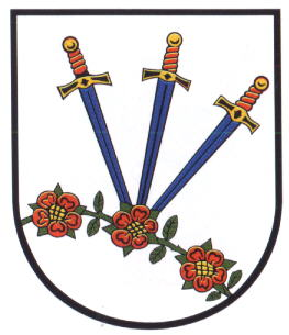 Wappen von Roßleben